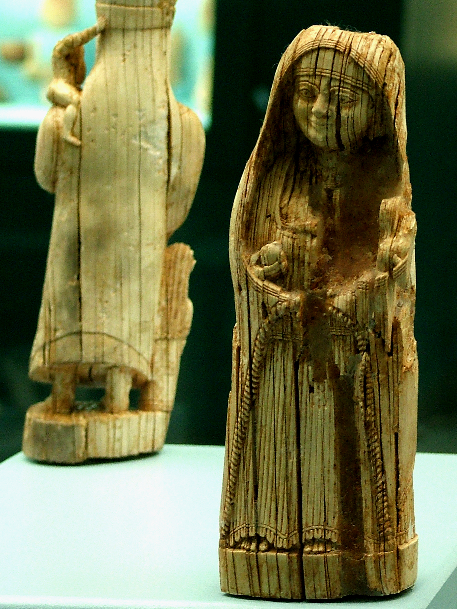 Elefántcsont nőidol (Régészeti Múzeum, Antalya, Törökország)